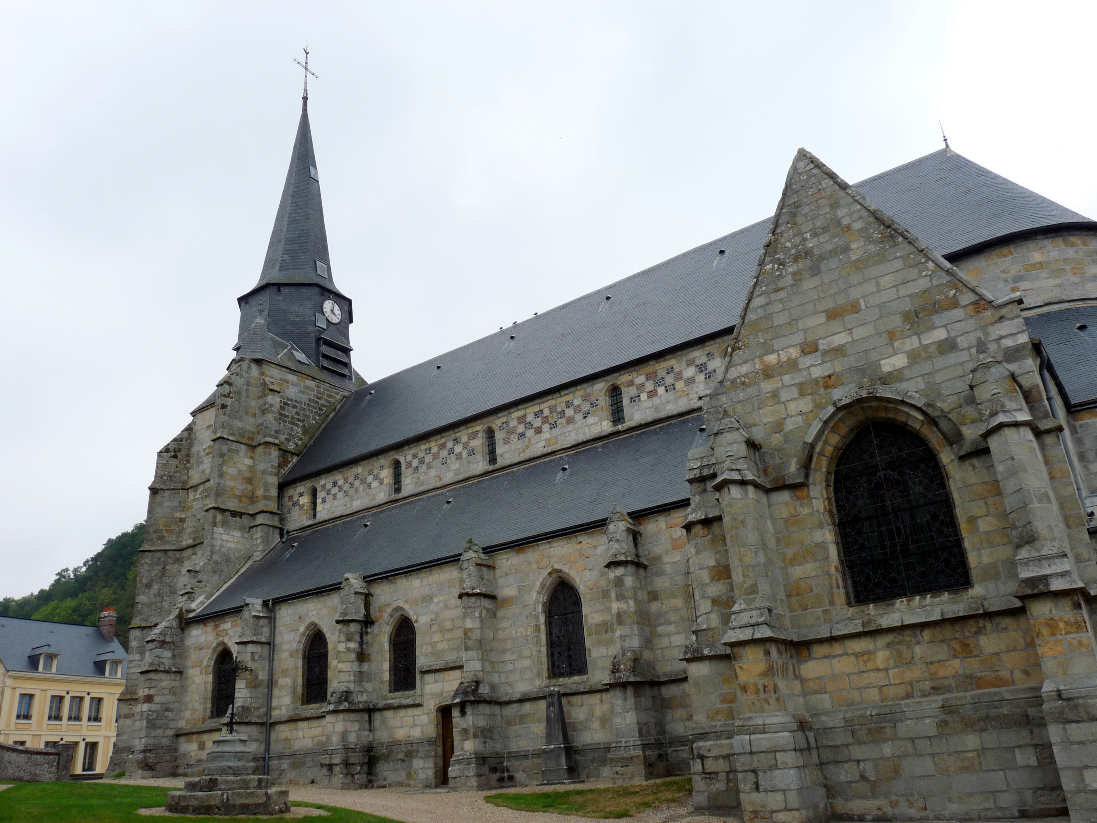 Église Saint-Martin de Cany (Inscrit) .